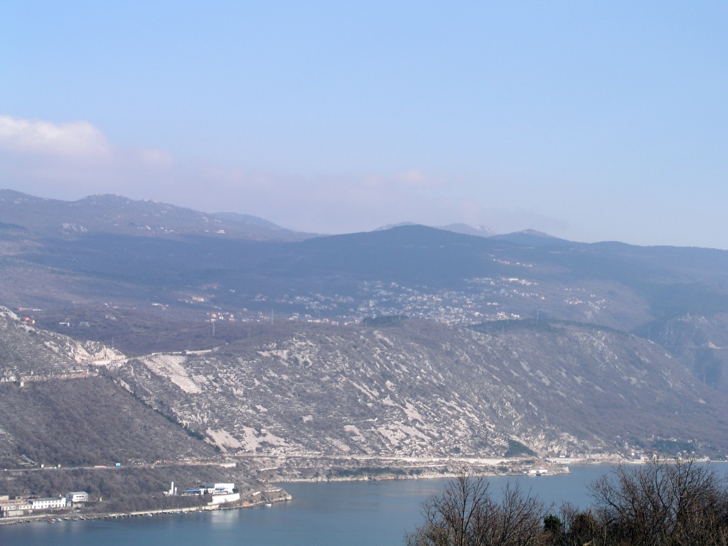 Hreljin iznad Bakarskog zaljeva, Hrvatska